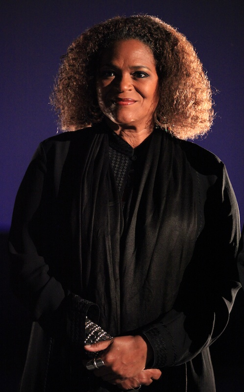 Jocelyne Béroard au Festival international du film d'amour de Mons.